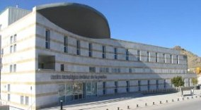 Centro Tecnológico Andaluz de la Piedra. Ubicado en Macael.